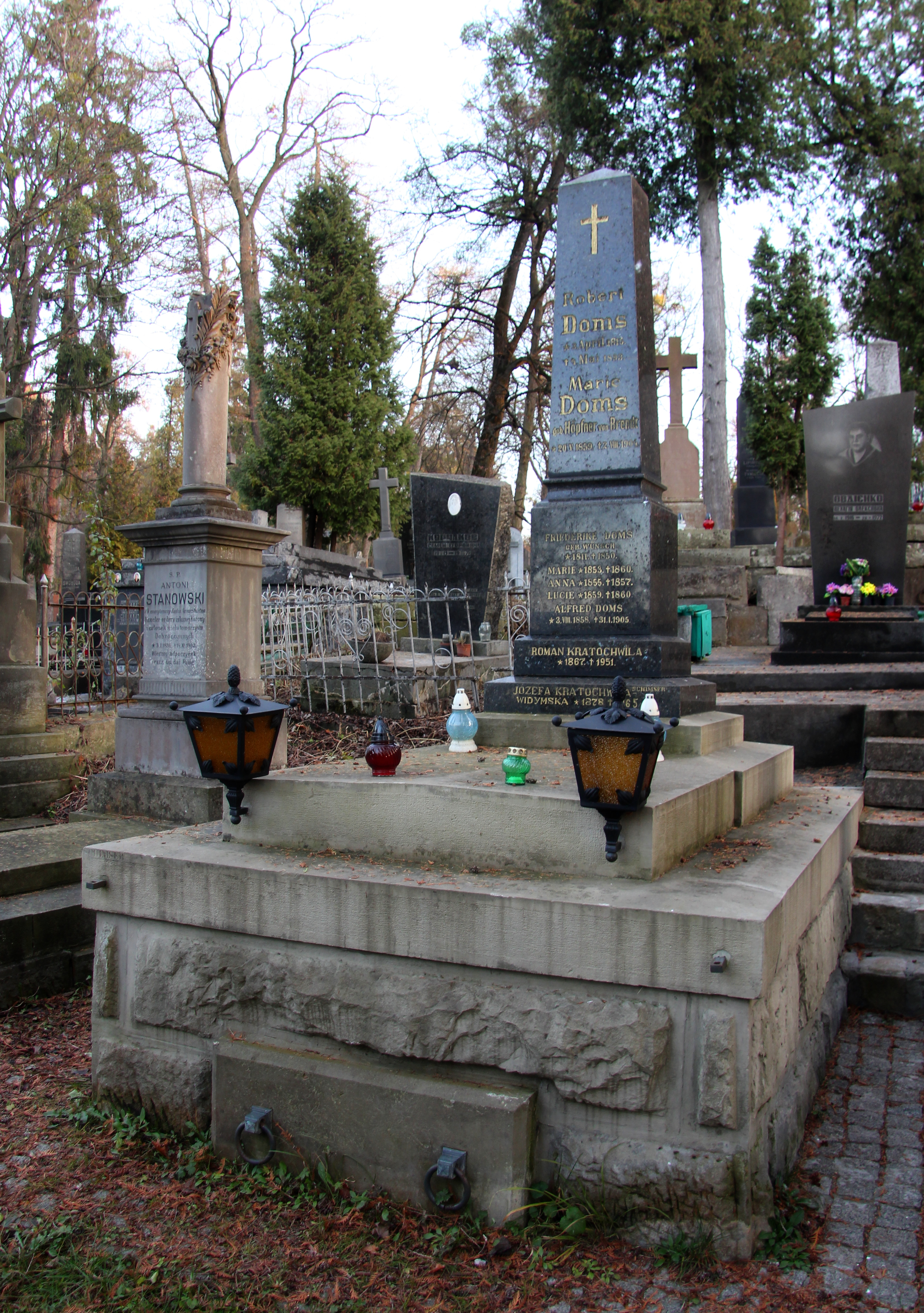 Гробівець родини Домс. Личаківський цвинтар , поле № 69.